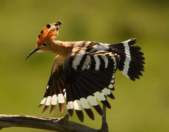 Upupa epops